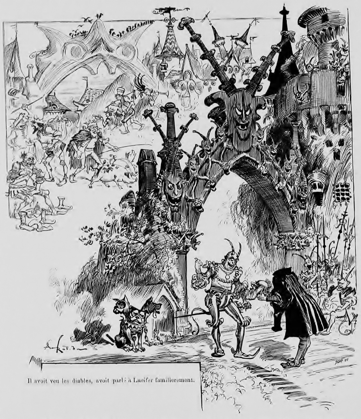 Vignette d'Albert Robida pour le chapitre XXX de Pantagruel. Oeuvres de Rabelais, édition par la Librairie Générale illustrée.